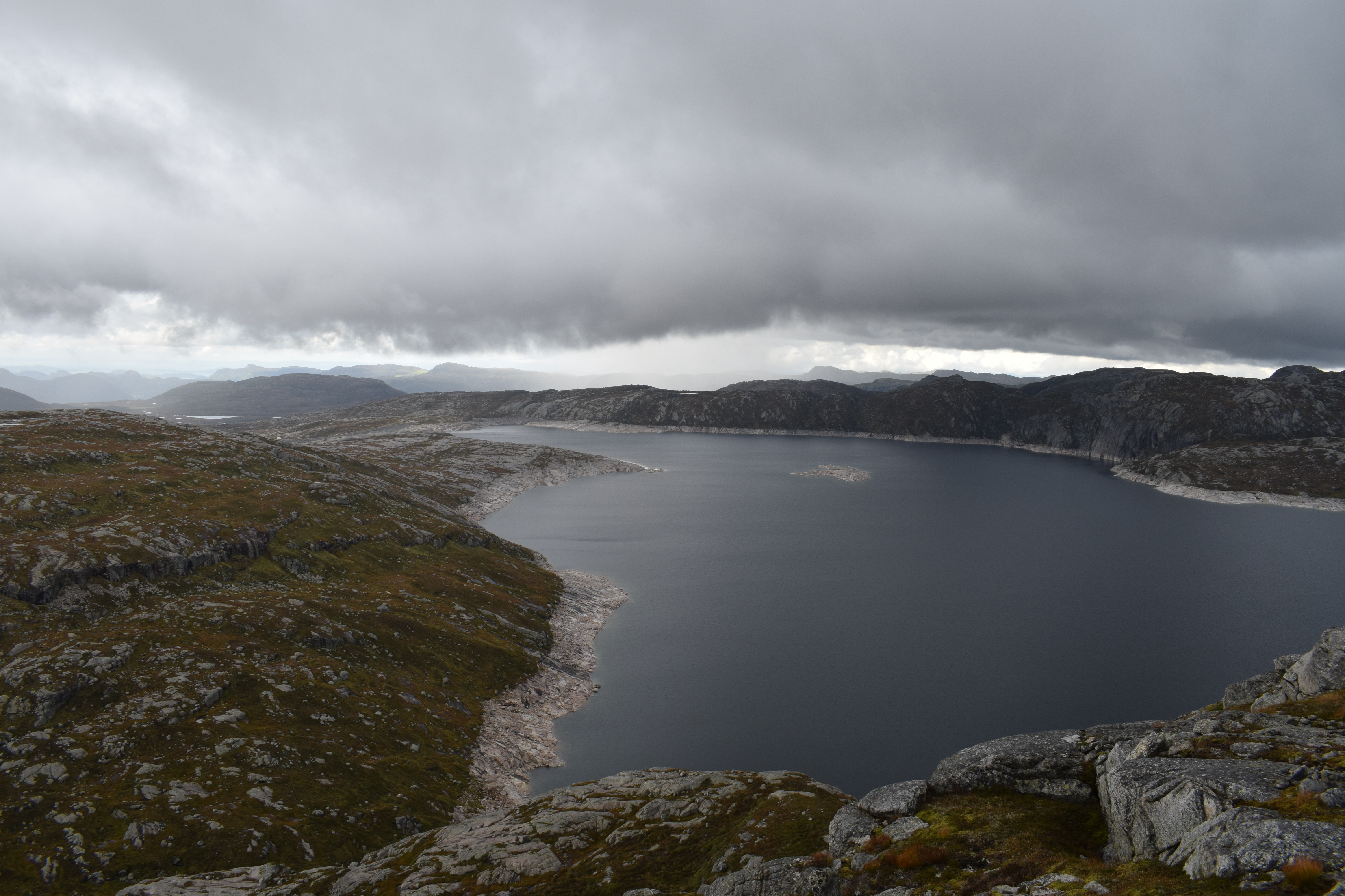 Vestre del av Lyngsvatnet